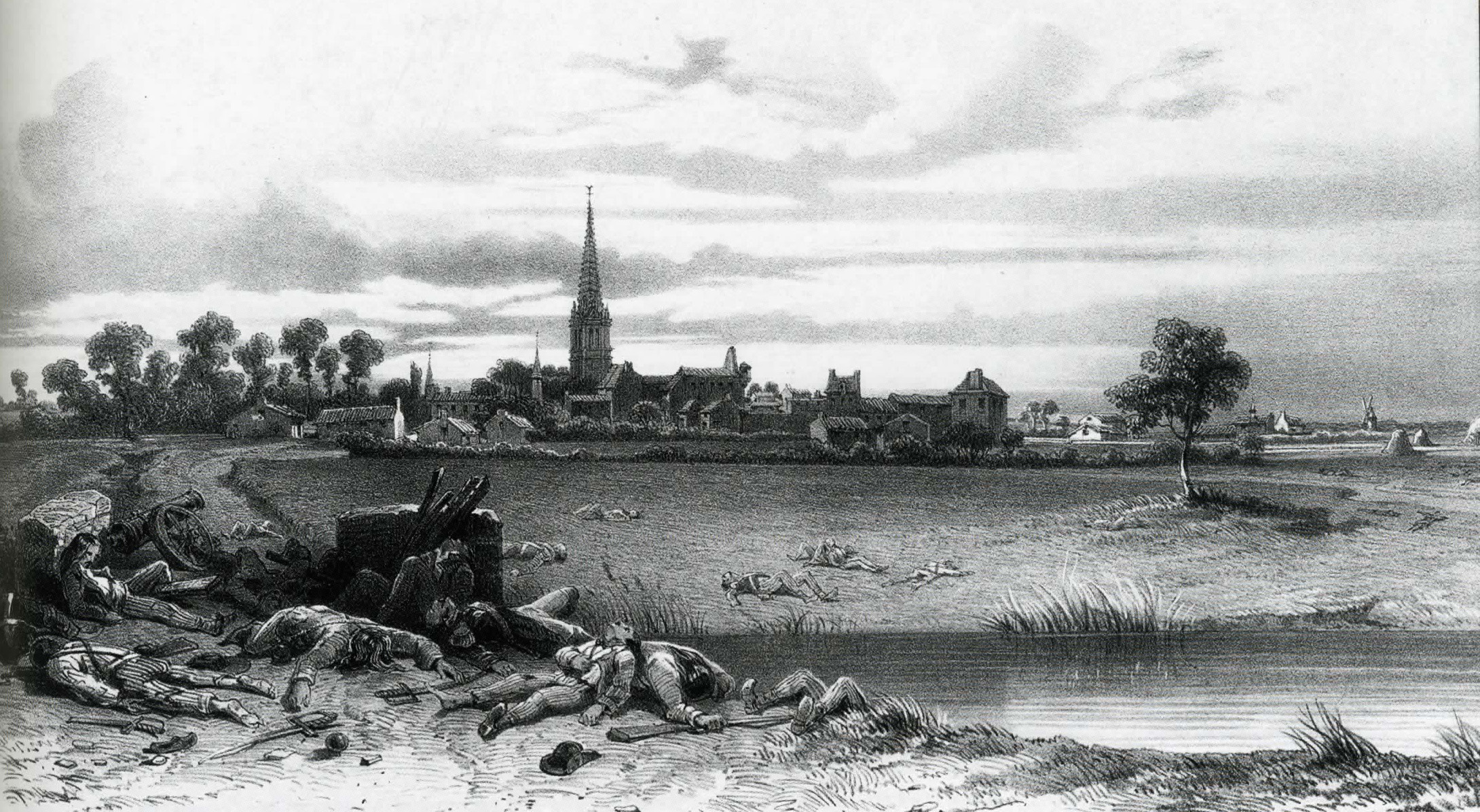 Bataille de §Luçon, 1793